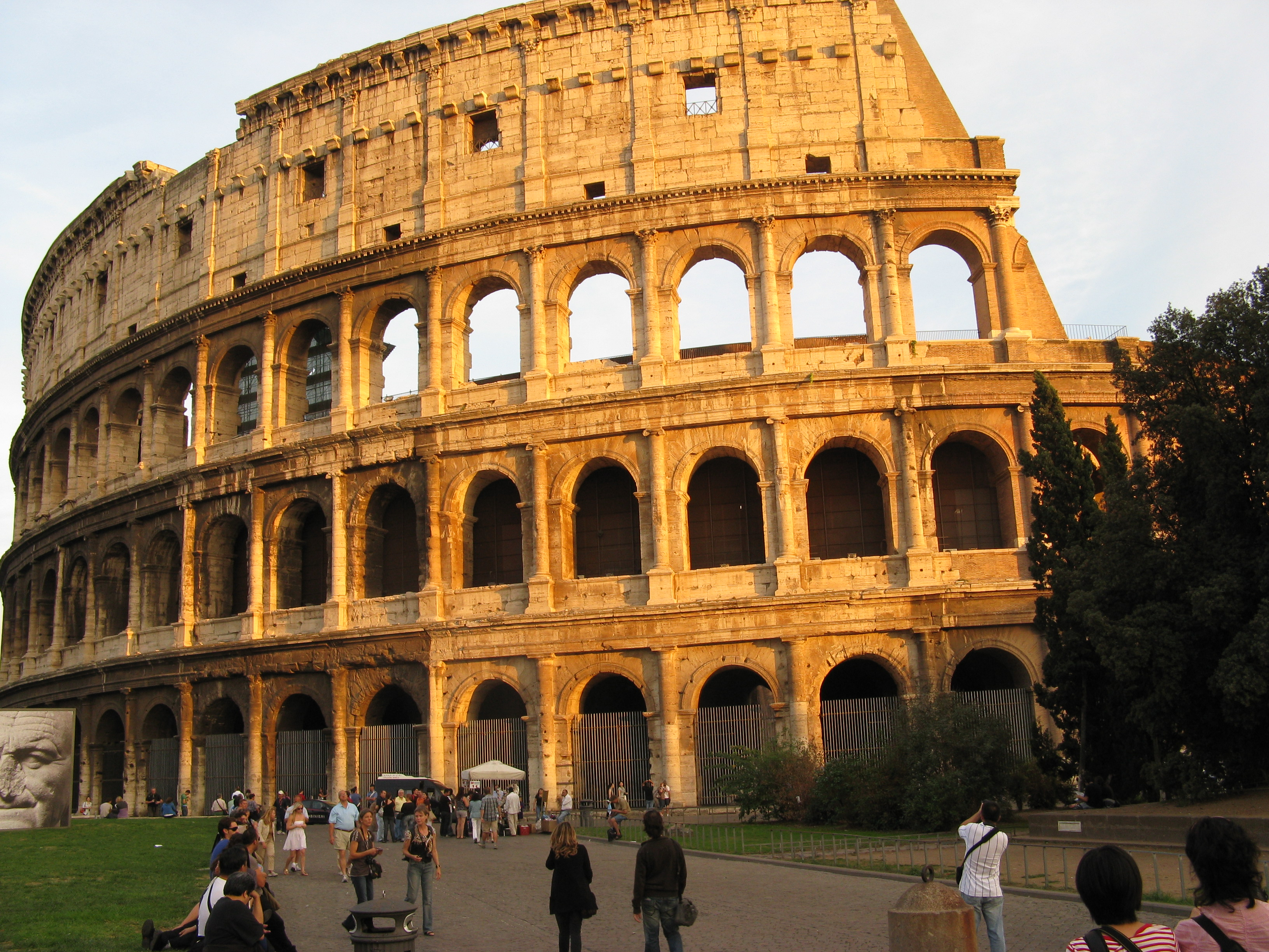 Colosseum.